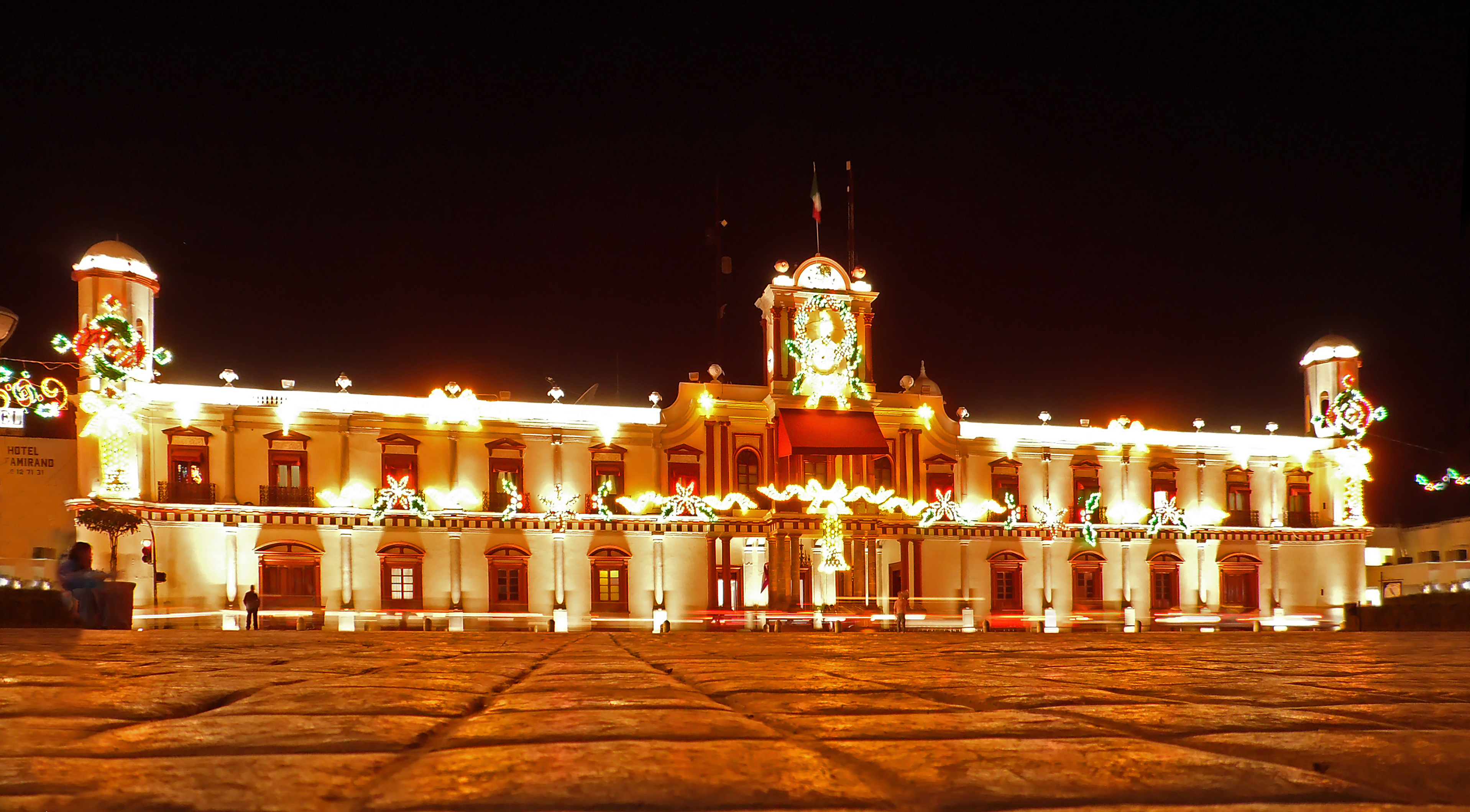 Vista del palacio de gobierno del estado de Nayarit.